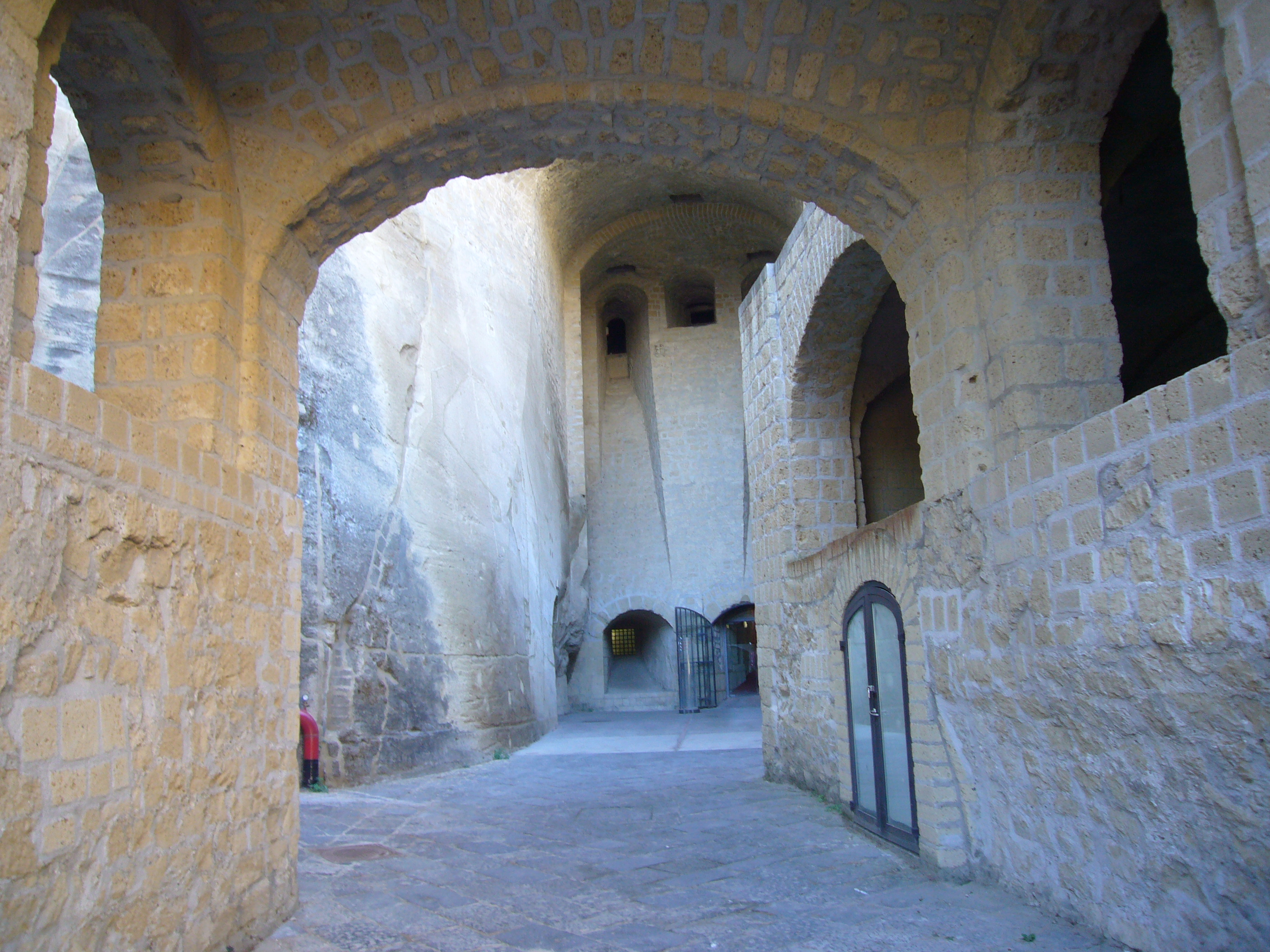 Napoli, Castel Sant'Elmo